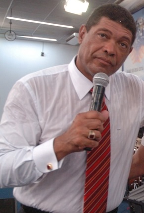 Category:Valdemiro Santiago em São Paulo.